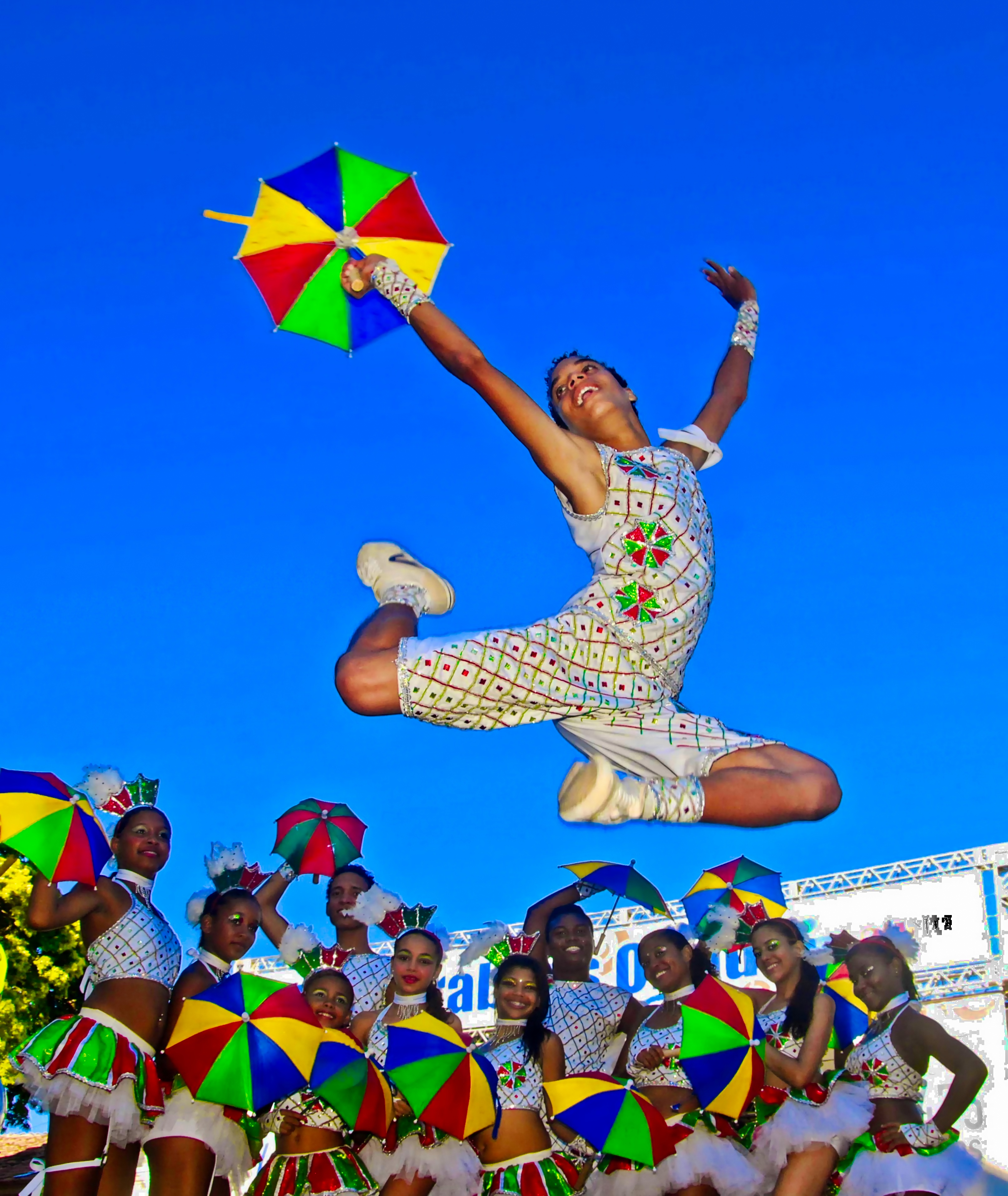 Passistas de Frevo - Pernambuco, Brasil.